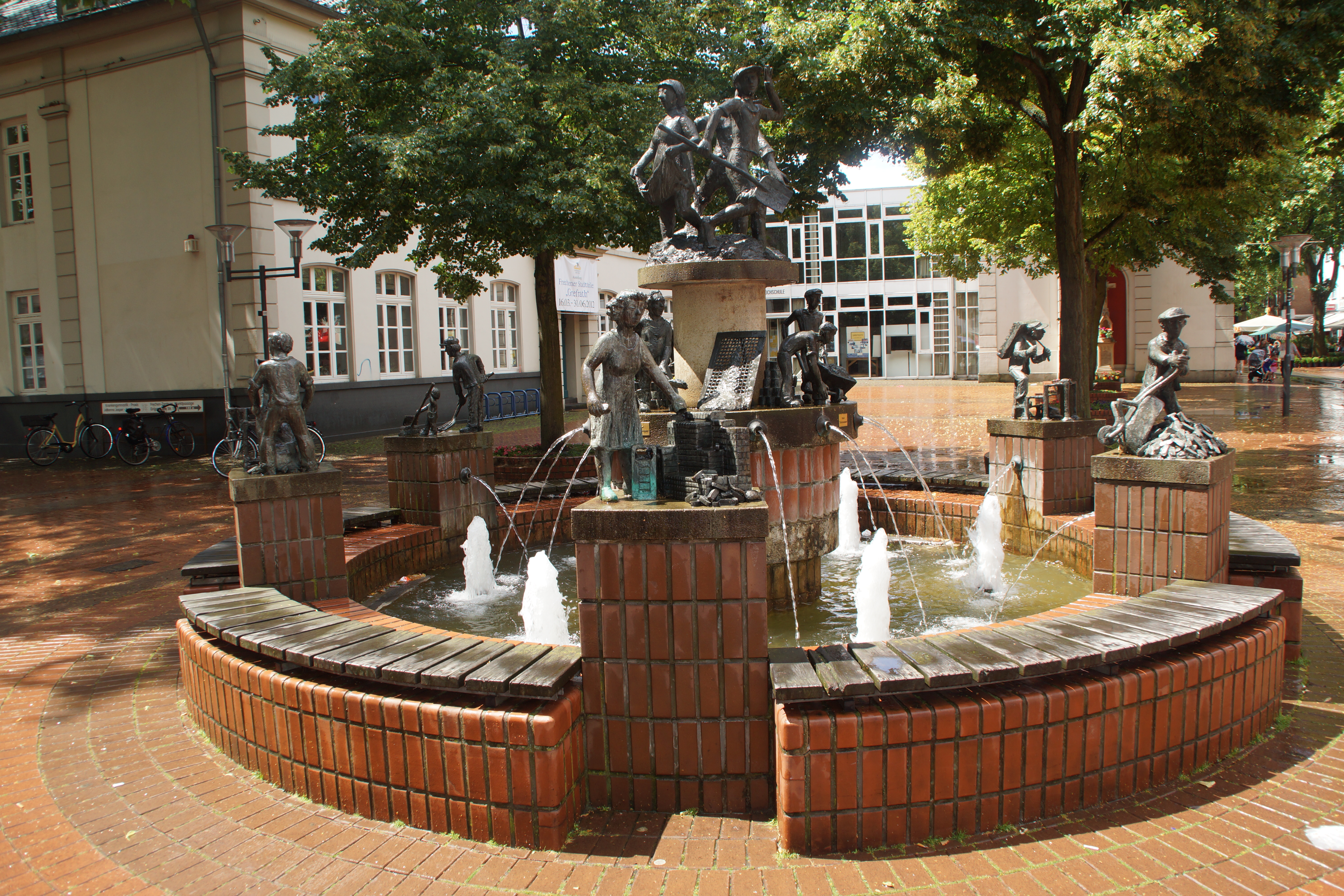 Klüttenbrunnen in der Frechener Fußgängerzone, gestaltet von Olaf Höhnen